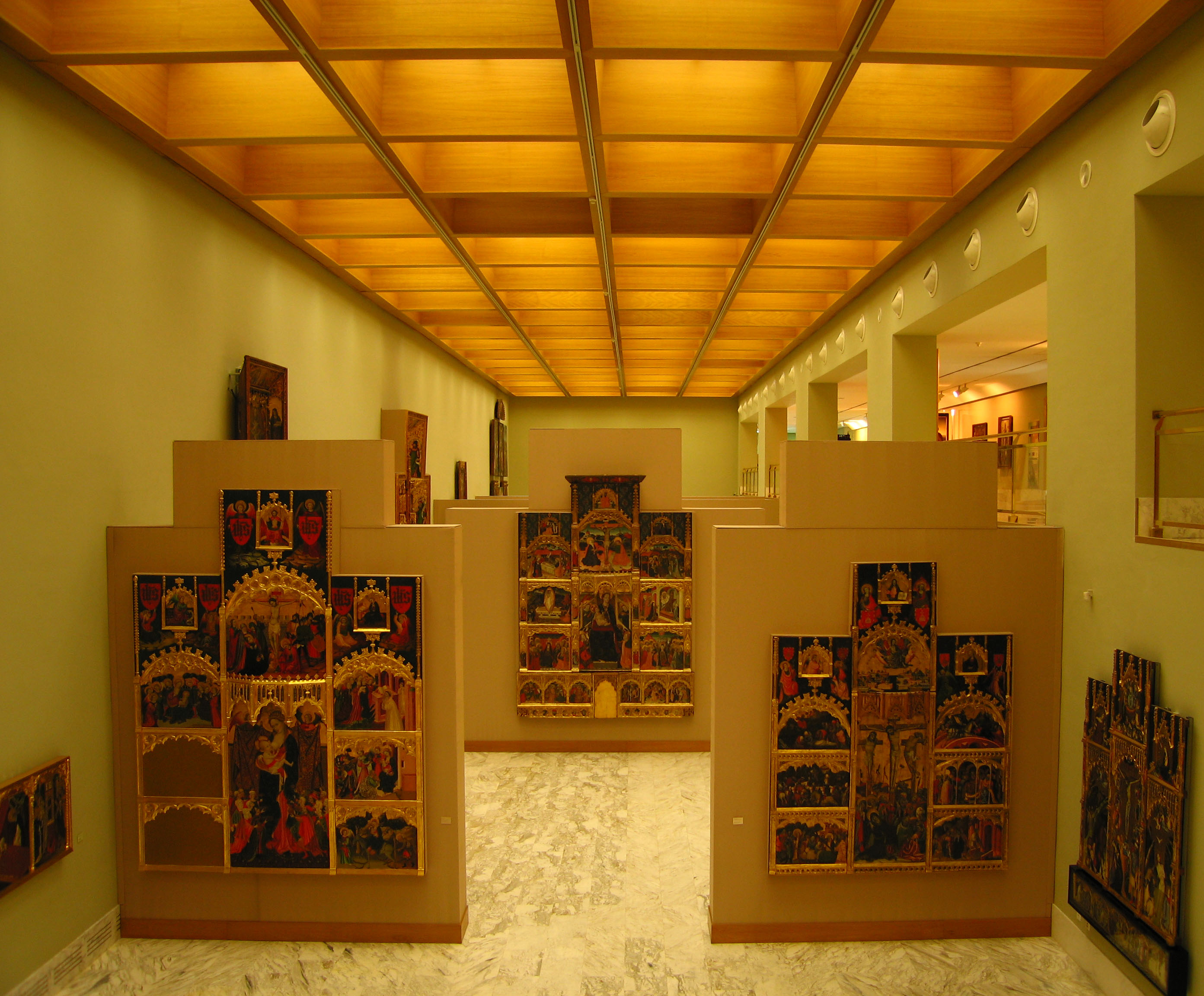 Sala de primitius valencians, Sant Pius V, València